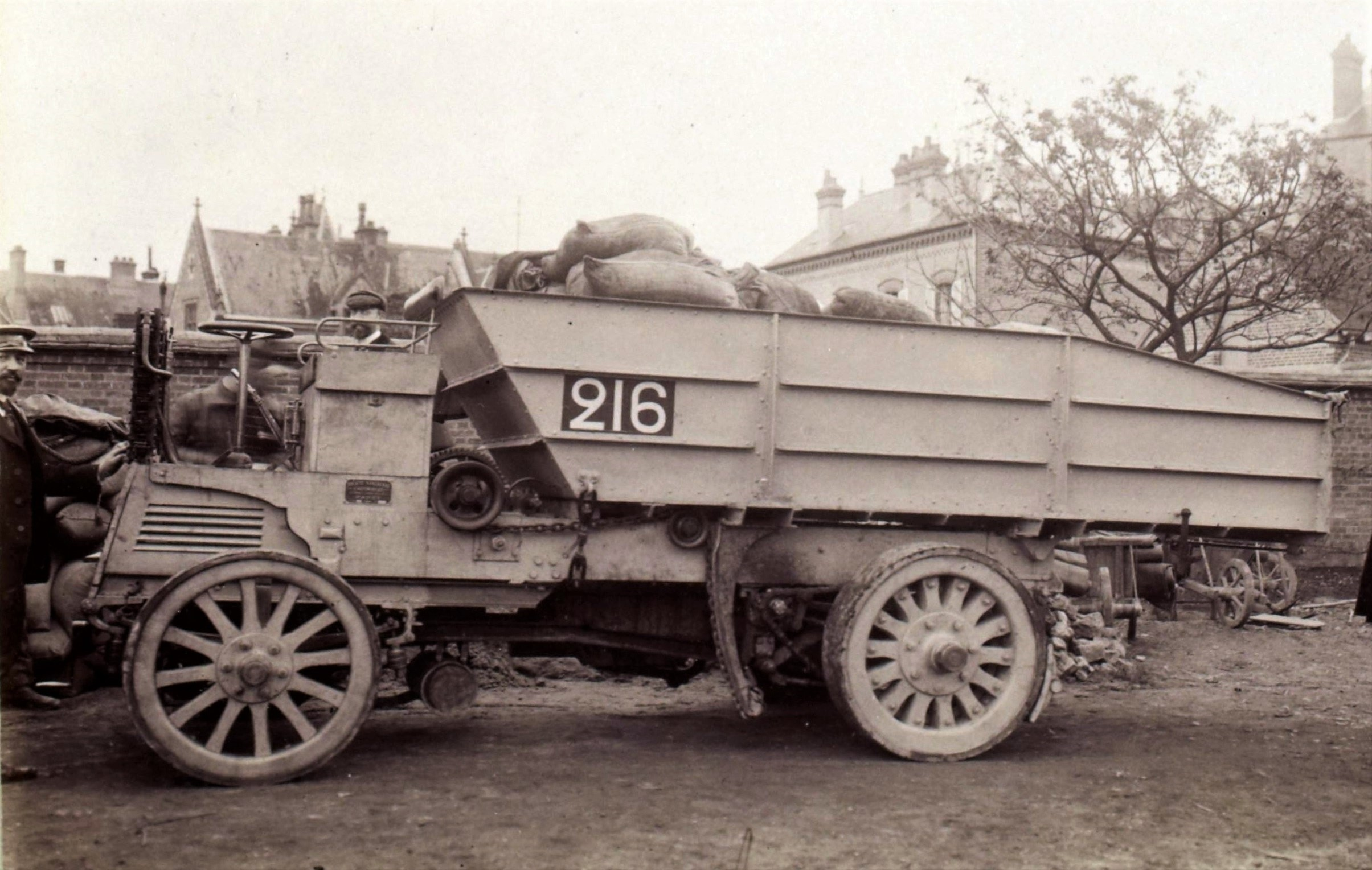 [Collection Jules Beau. Photographie sportive] : T. 17. Année 1902 / Jules Beau : F. 29. [Concours général de l'alcool]